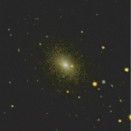 NGC 3923